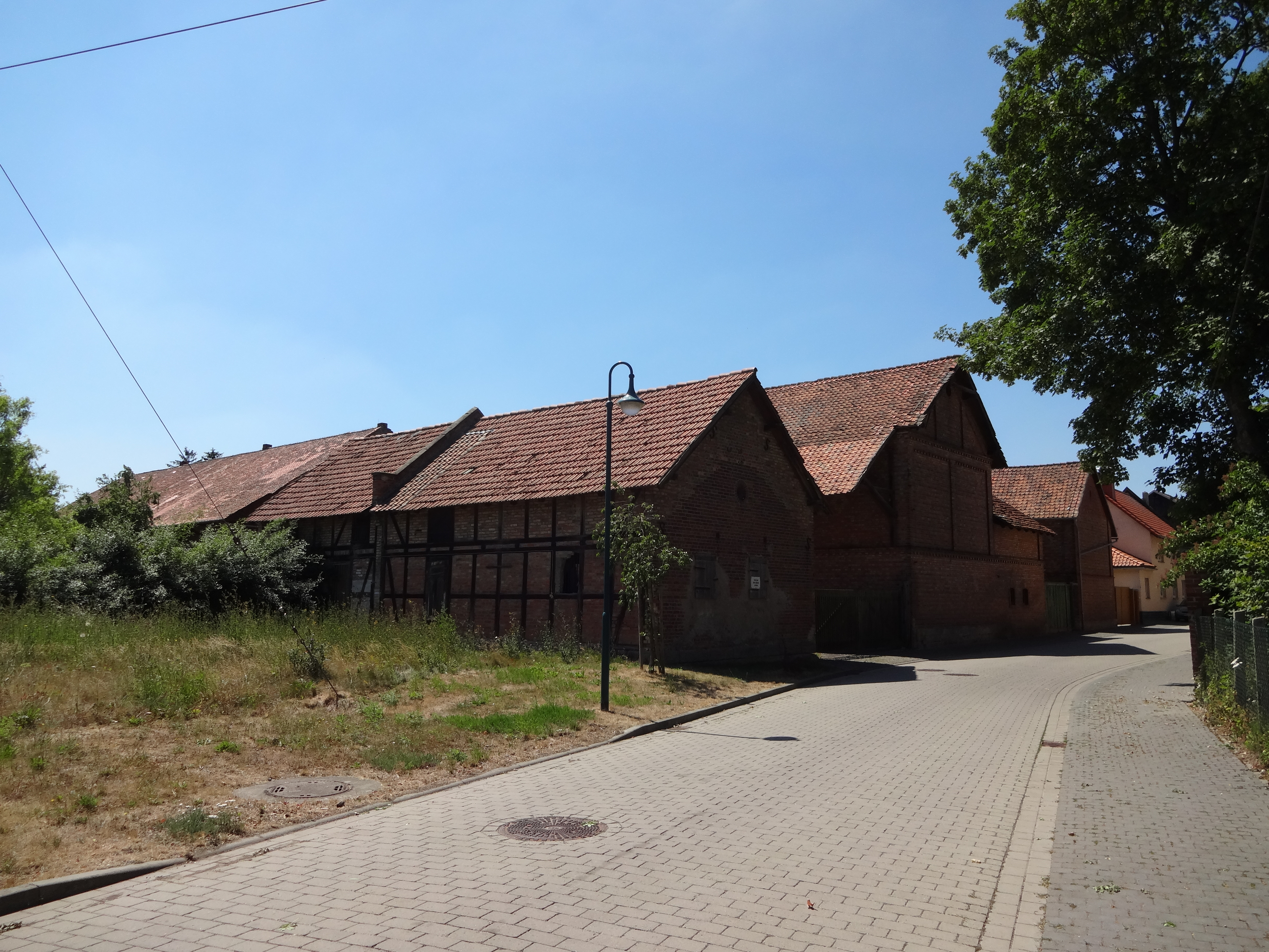 denkmalgeschützter Bauernhof in der Hüttenstraße 7 in Dedeleben